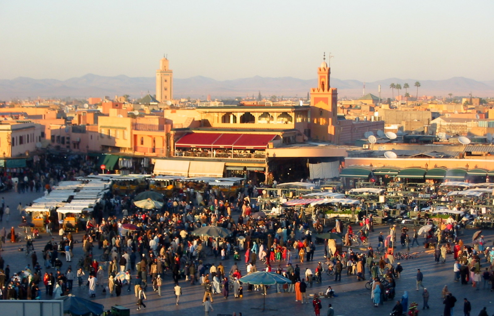 Djemaa el Fna, evening